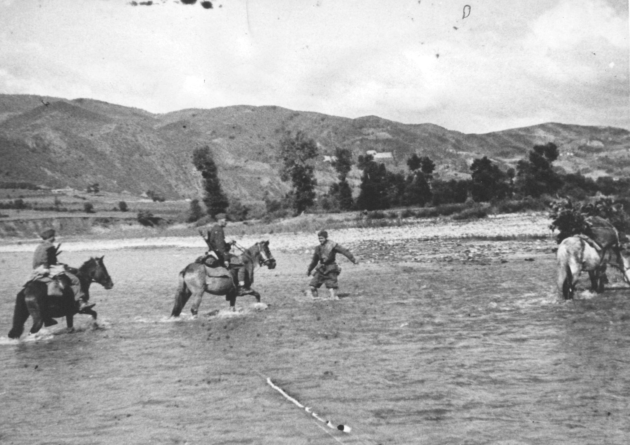 Srpskohrvatski / српскохрватски: Partizani prelaze Ibar 4. avgusta 1944.